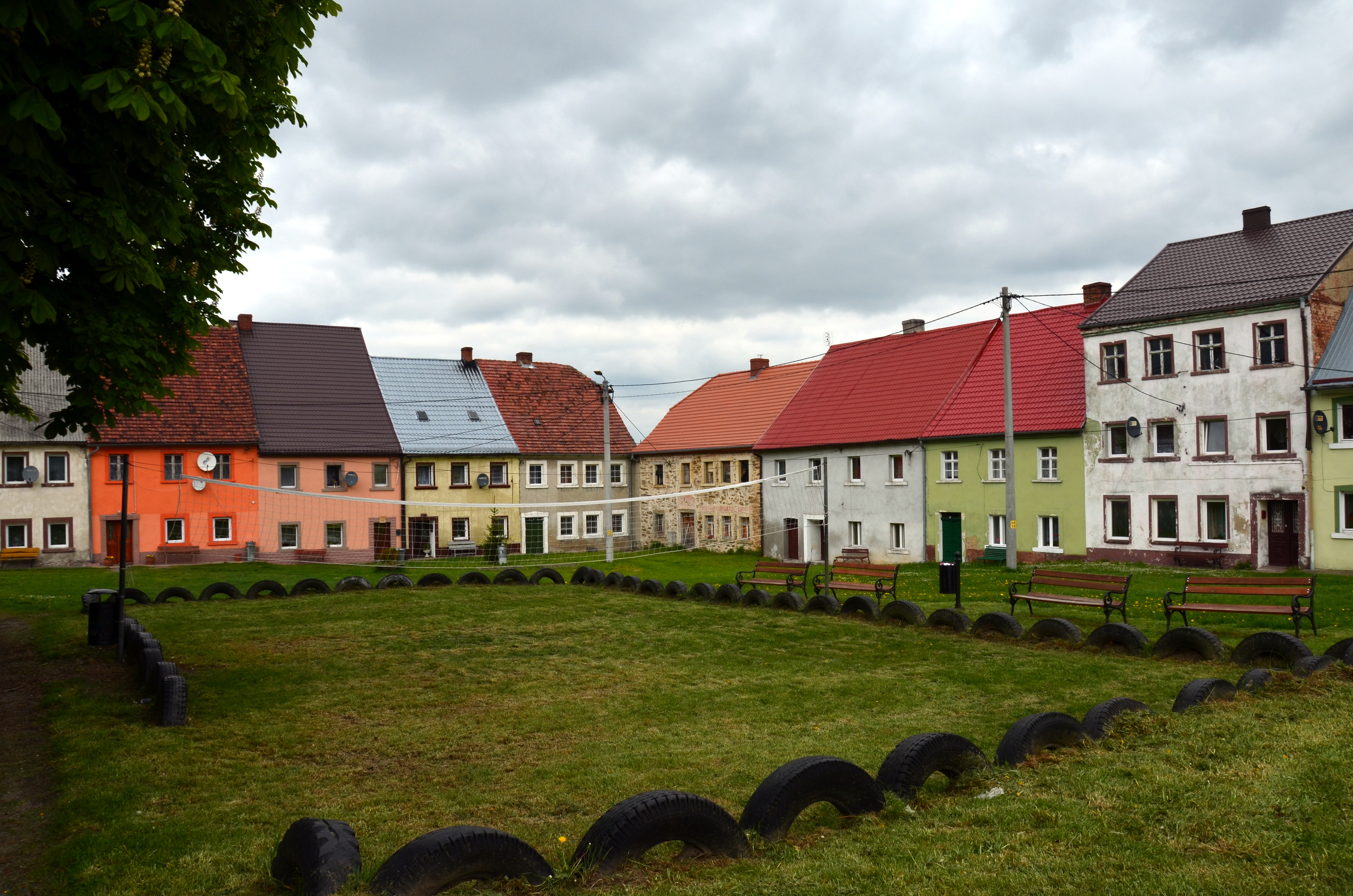 Złotniki Lubańskie - Rynek w obrębie starego miasta, 1672